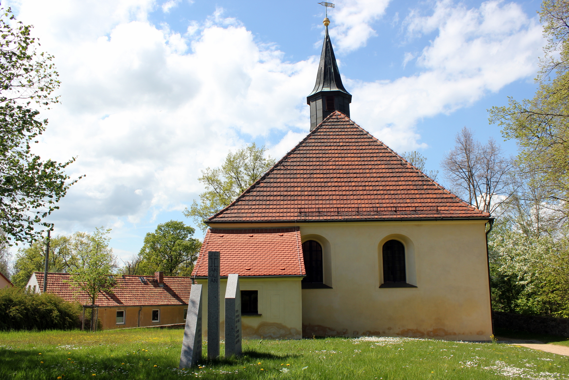 Hornjoserbsce: Kotecy; ewangelska cyrkej z pomnikom Jana Kiliana.